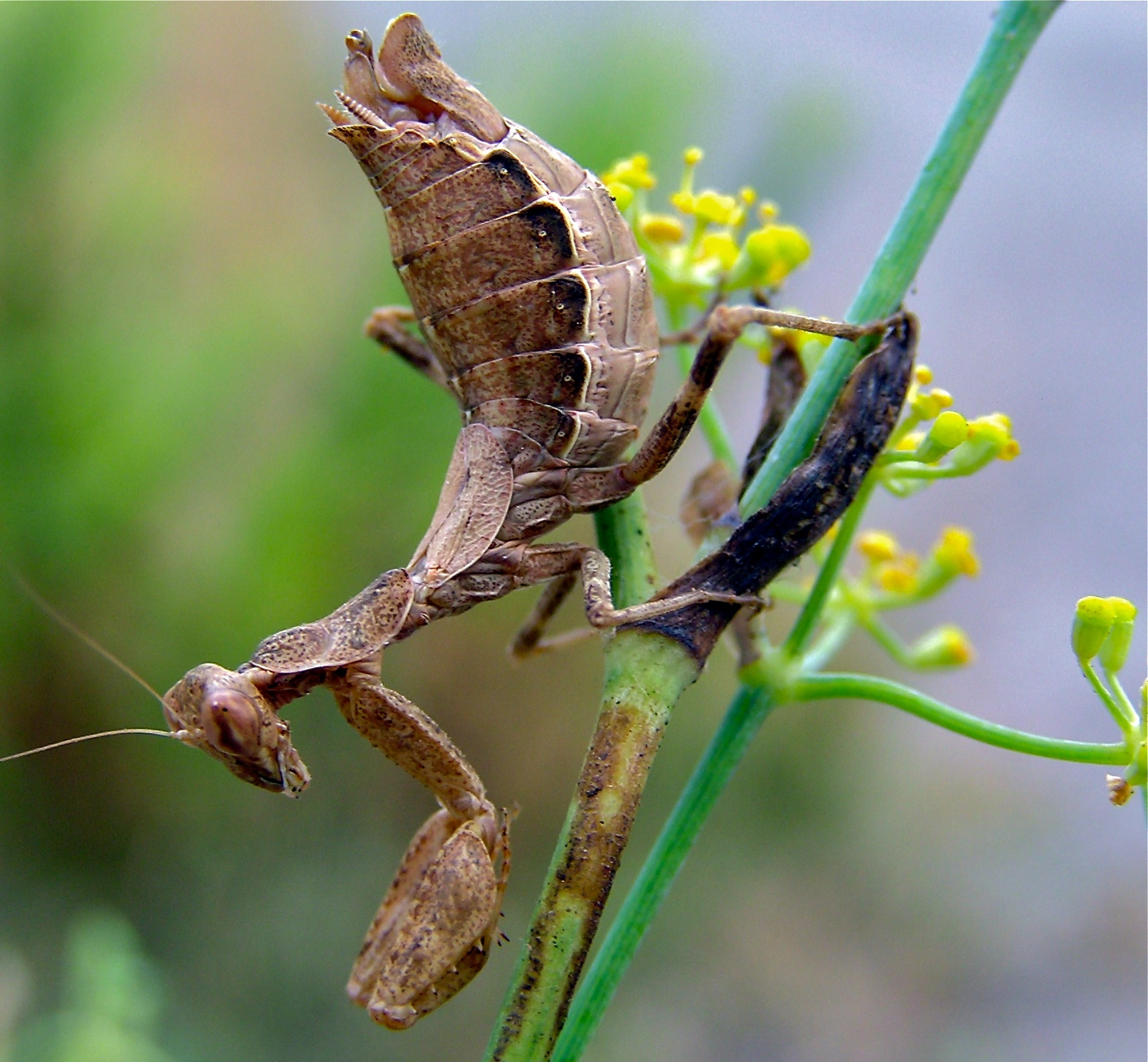 Gruissan, Aude, FRANCE